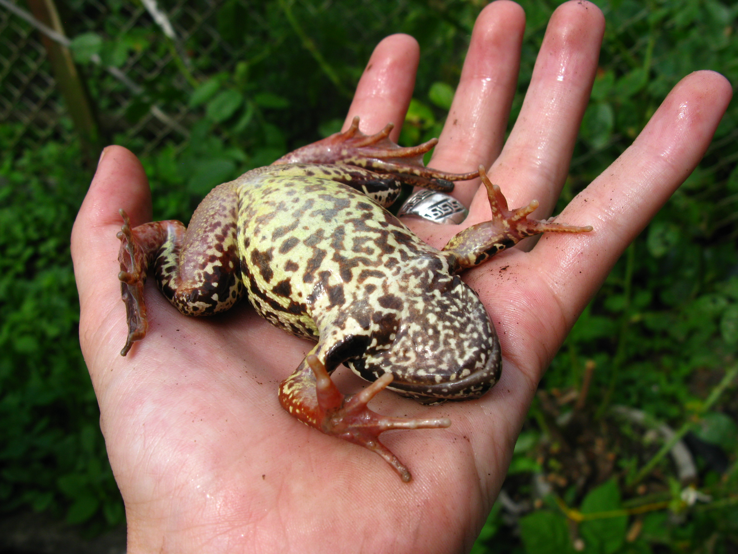 Перевёрнутая травяная лягушка (Rana temporaria) близ р. Лососянка.